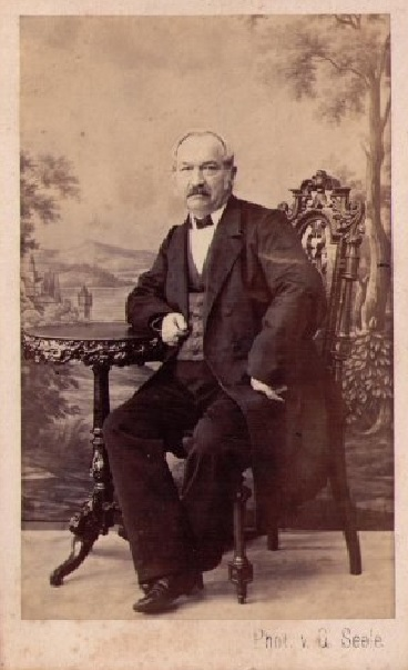 Bild Gottfried Emanuel Schmolling um 1864